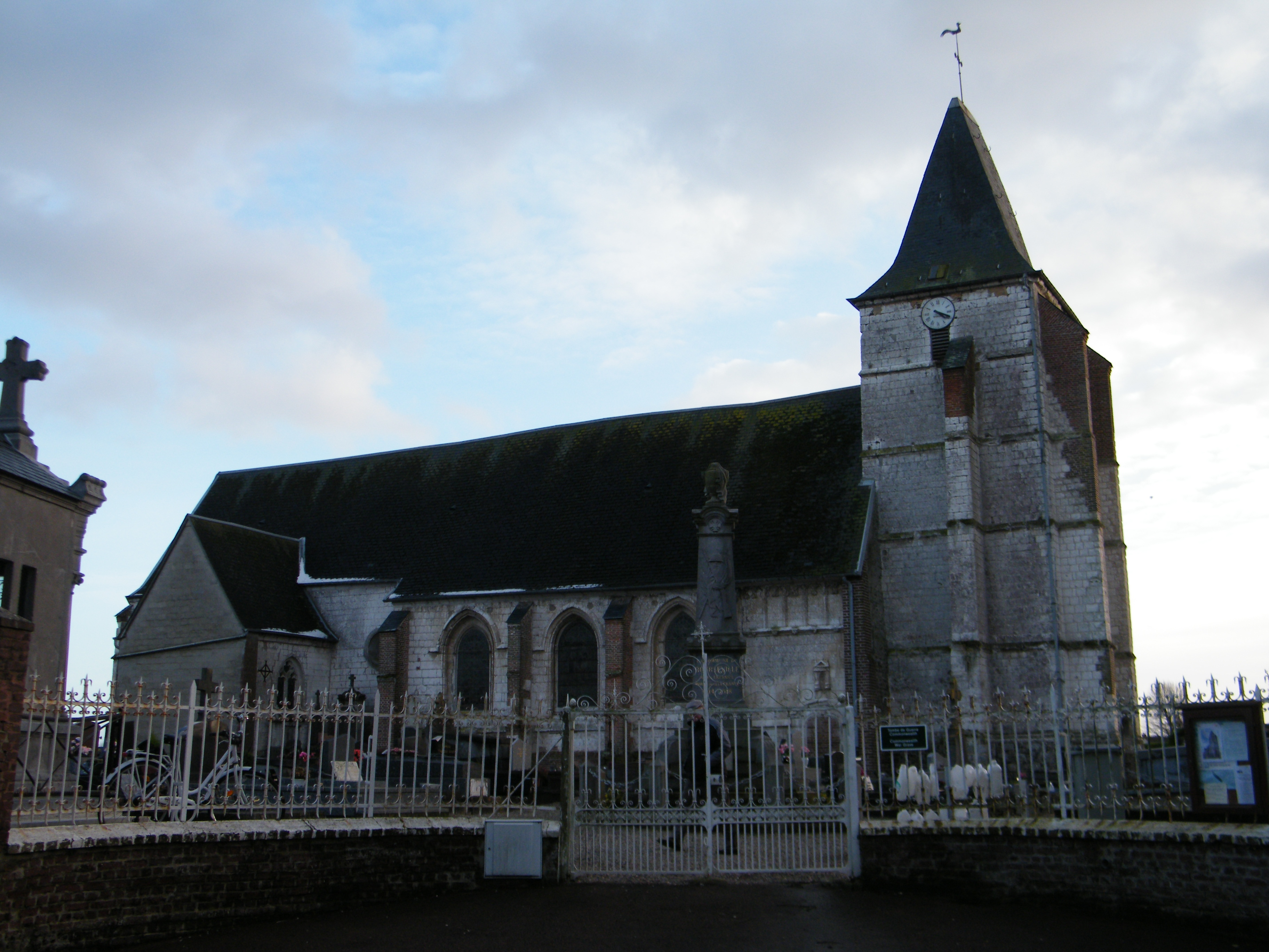 église.